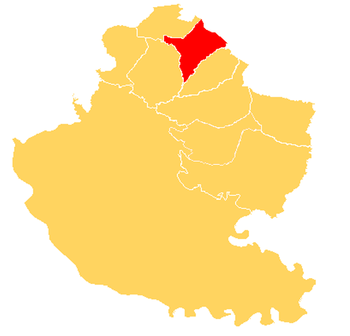 Distrito Hinojal se encuentra en el Norte del Departamento Victoria